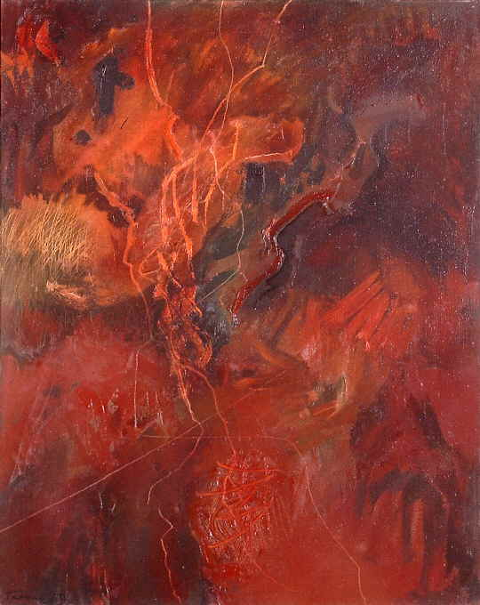 Cres - Rote Wand 1959 - Öl auf Leinwand 100 x 80